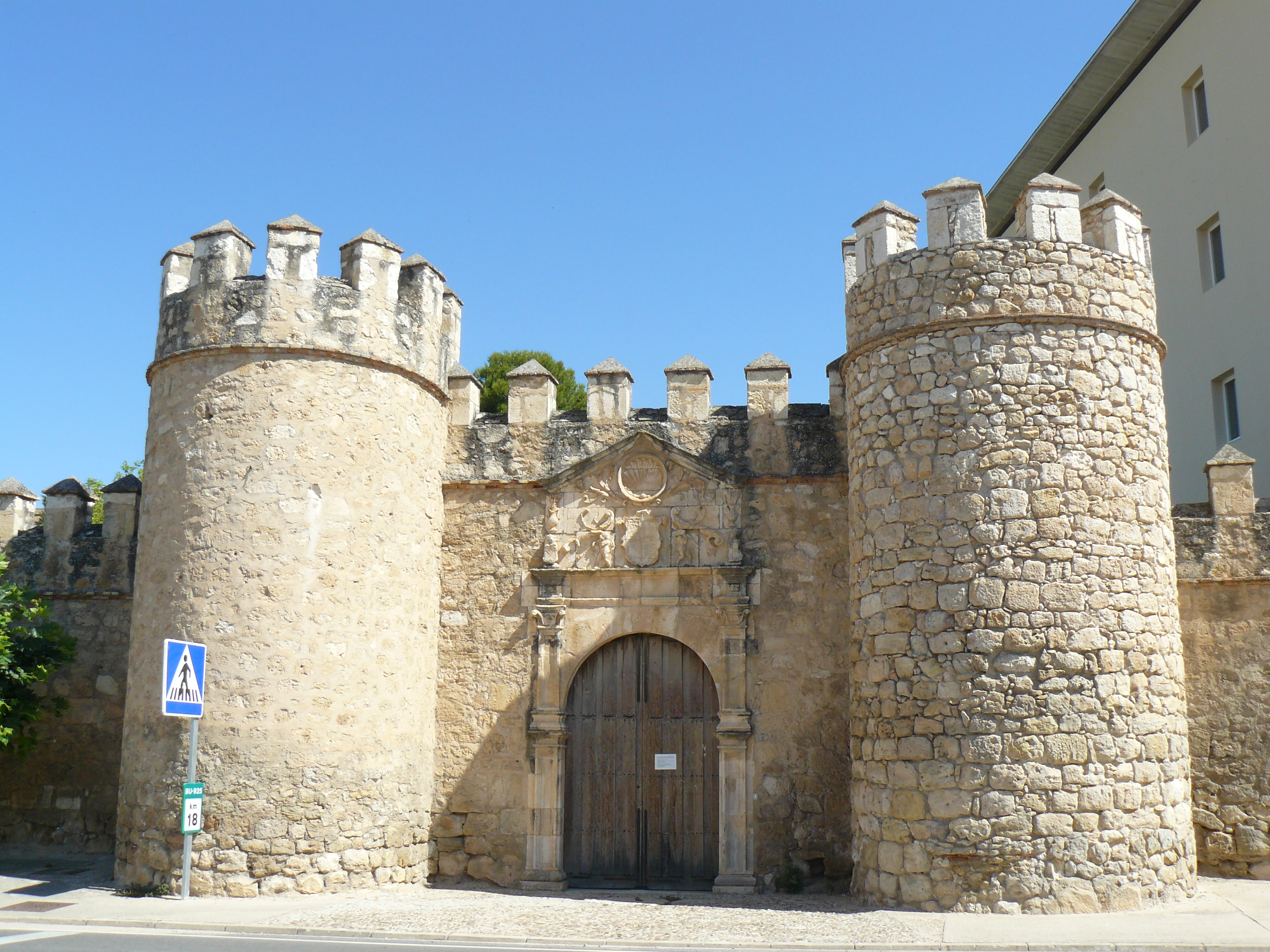 Peñaranda de Duero, Burgos.